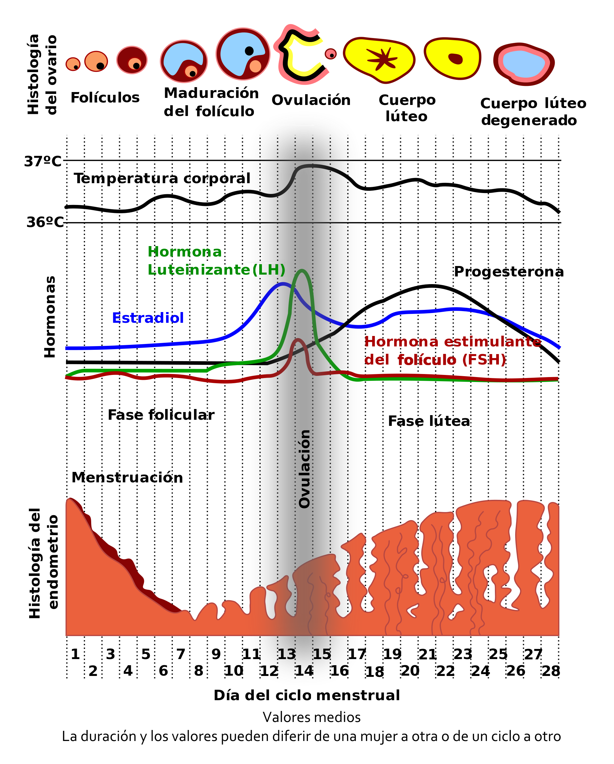 Traducción de la imagen MenstrualCycle.png, que representa el ciclo menstrual humano